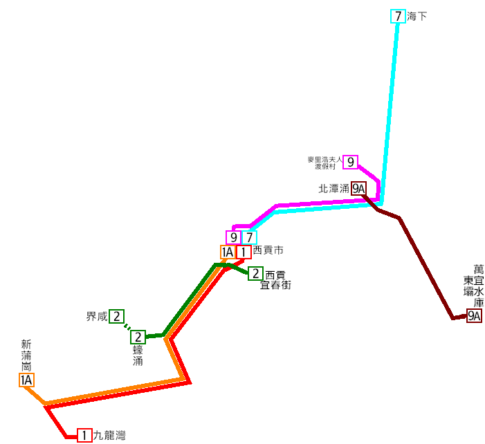 西貢專線小巴旗下路線的網絡圖